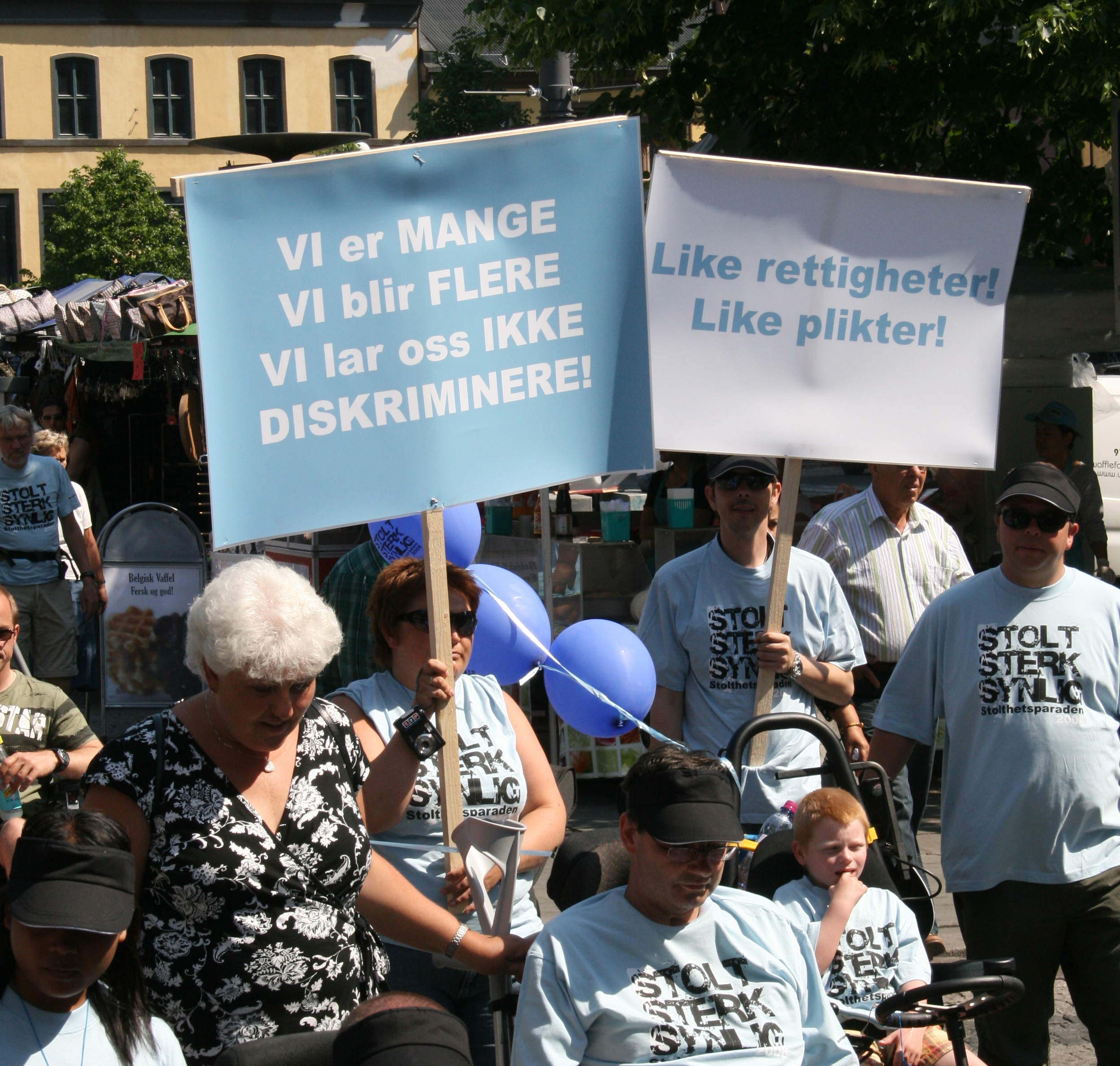 Stolt – sterk – synlig; fra Stolthetsparaden 2008 i Oslo